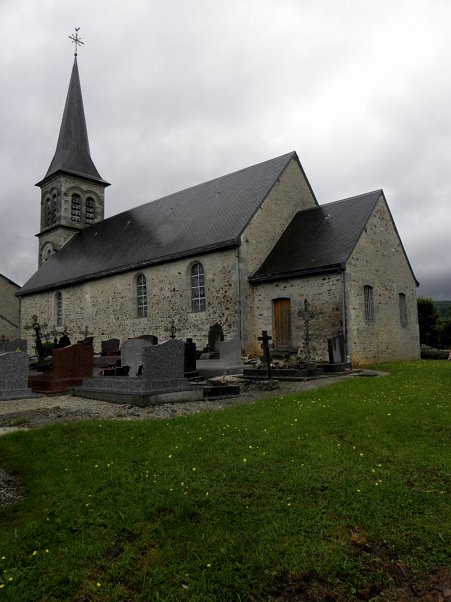 Église Saint-Nicolas de Saint-Nicolas-des-Bois (61). Chevet et flanc sud.